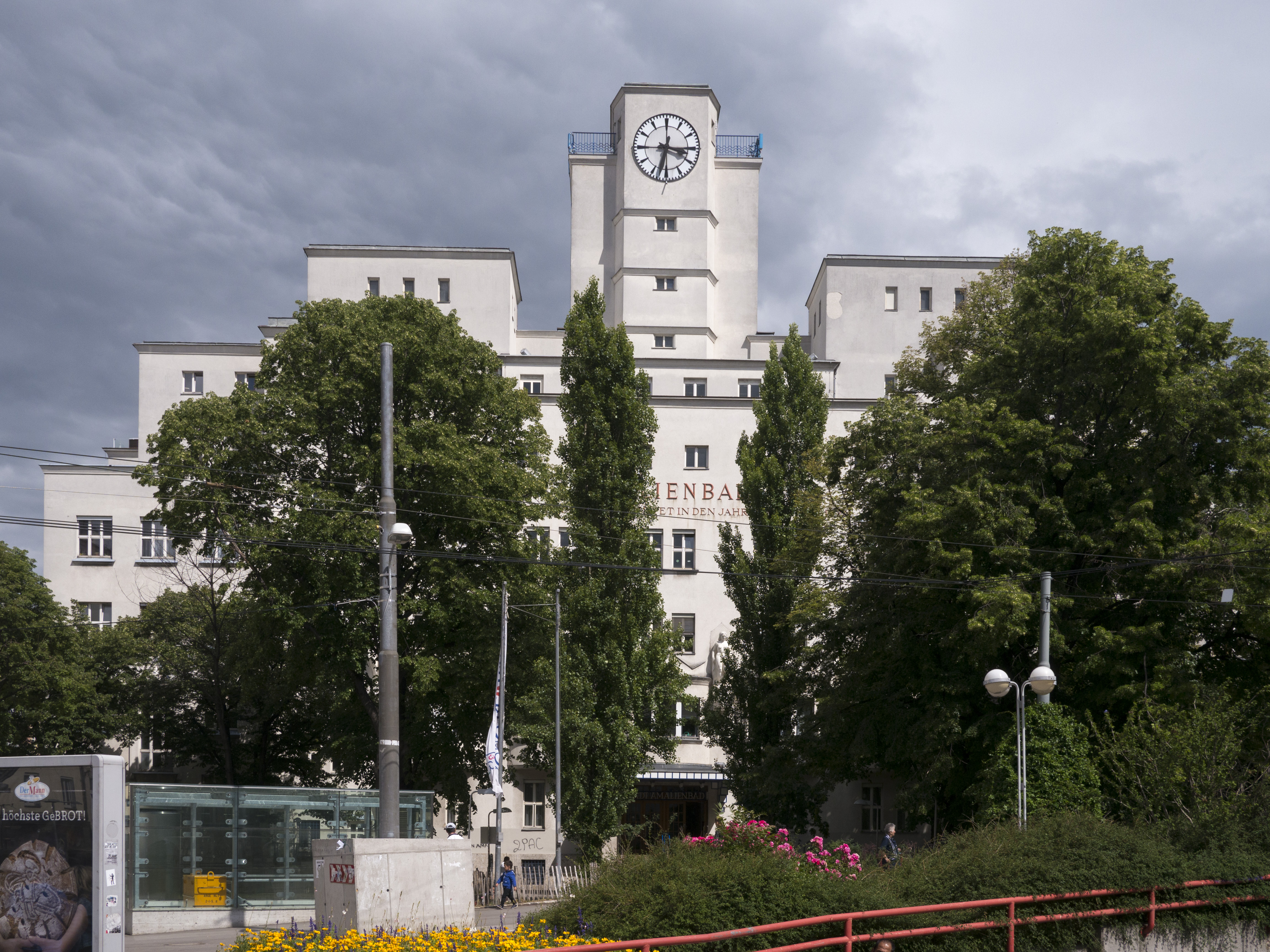 Amalienbad